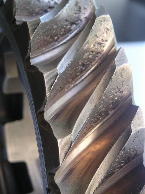 Roue creuse pour pont arrière à vis